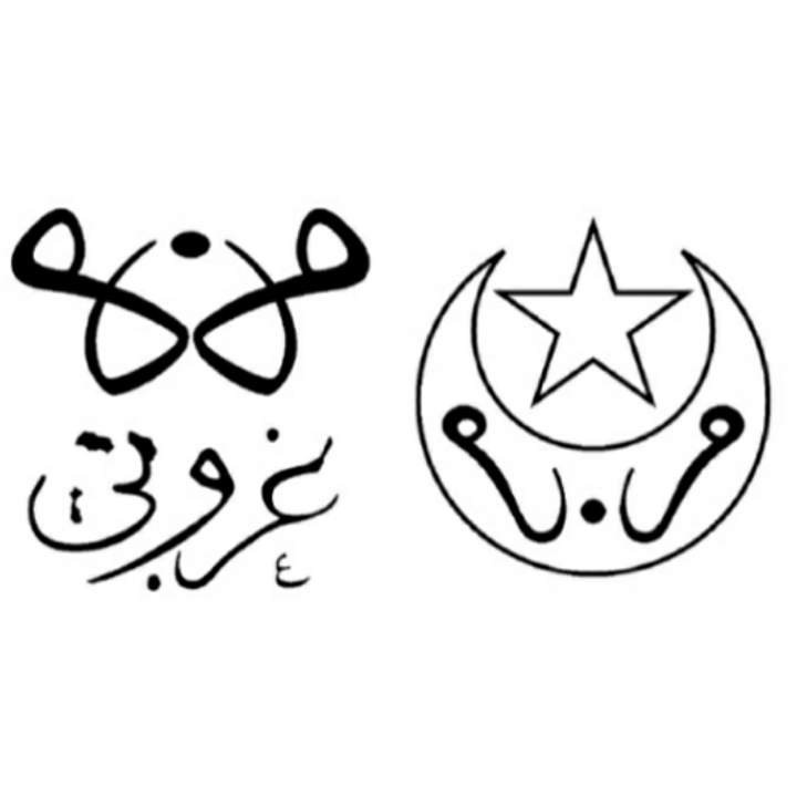 Mim Mim grubu logosu